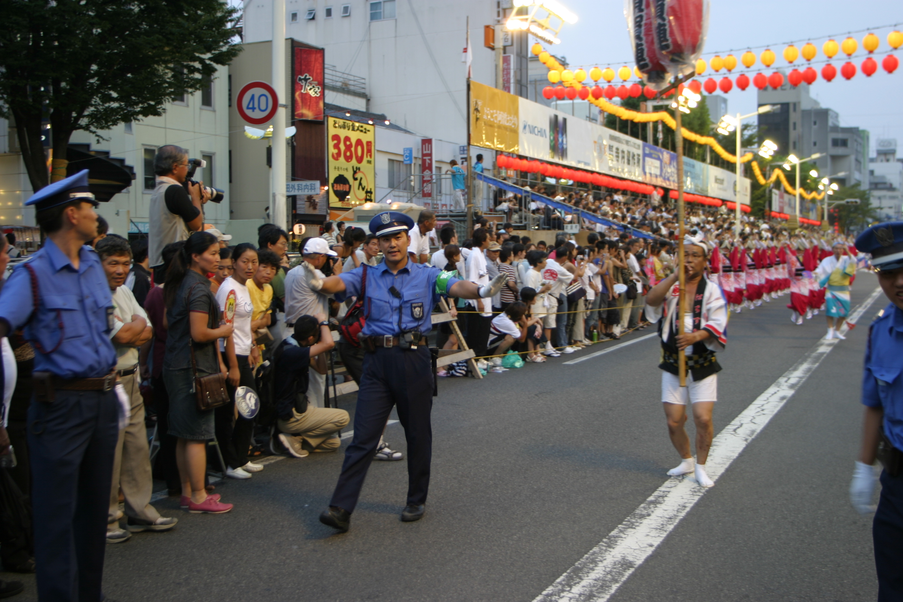 雑踏警備風景 （徳島県・阿波おどり）ALSOK